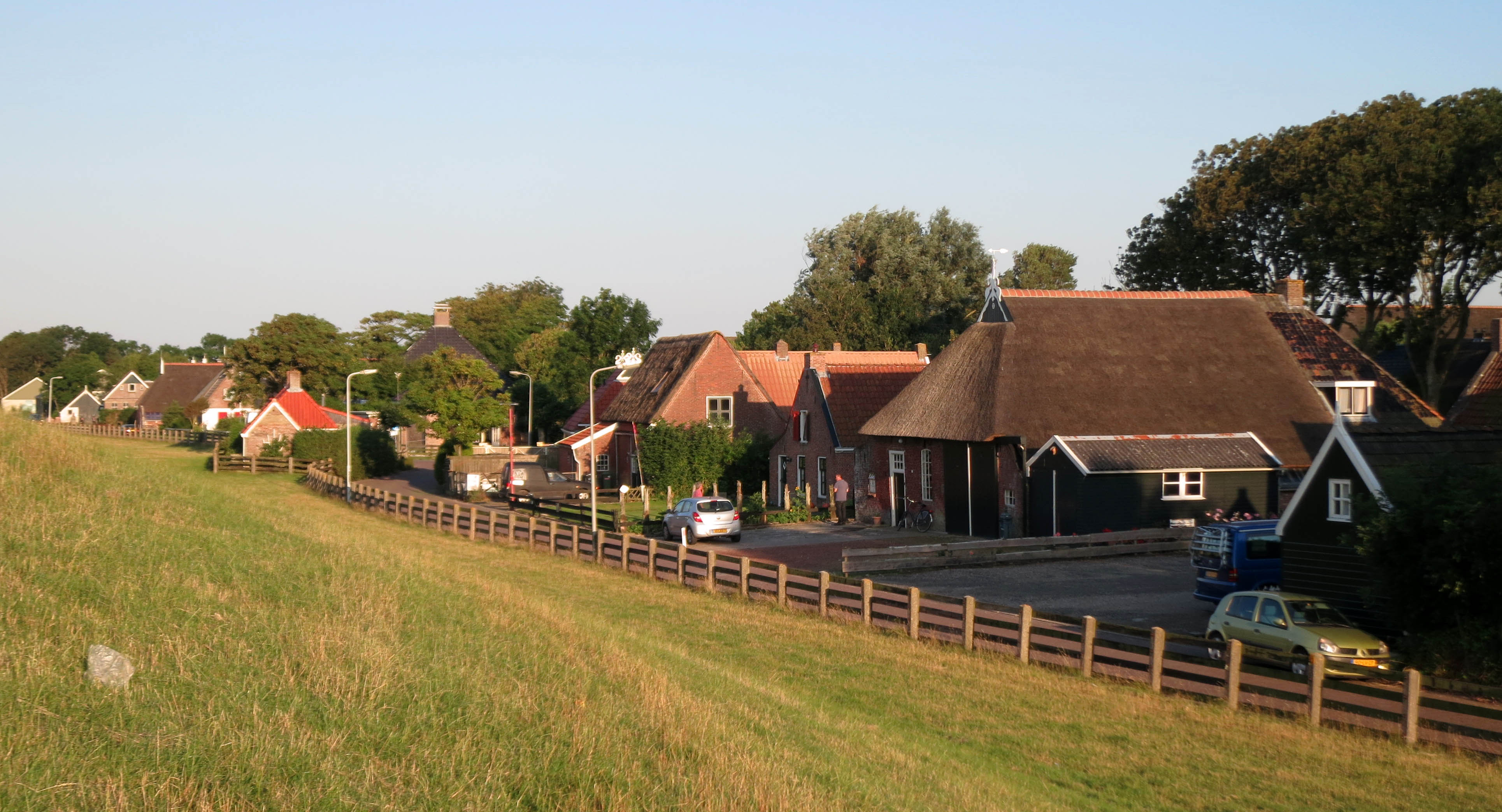 Peasens, Achterwei (NL)